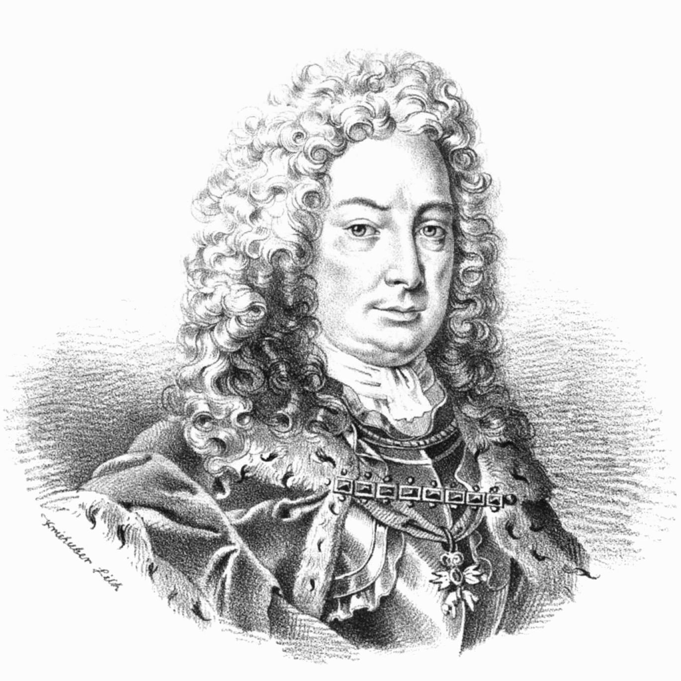 Miklós Graf Pálffy von Erdöd (1657–1732), Hungarian general and statesman